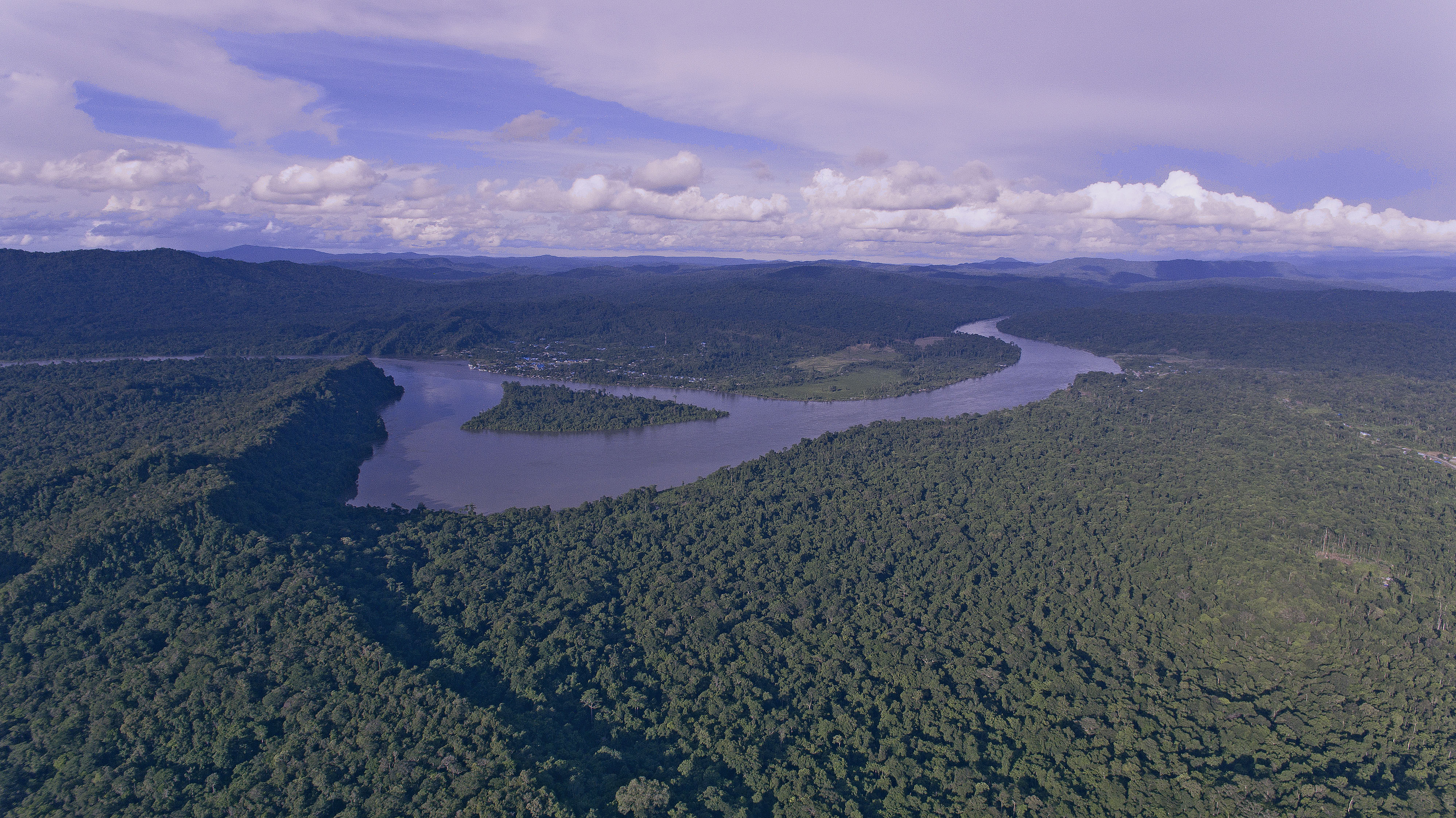 Foto Udara yang memperlihatkan Kota Kasonaweja yang dilalui oleh Sungai Mamberamo